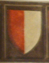 Arte dei linaiuoli